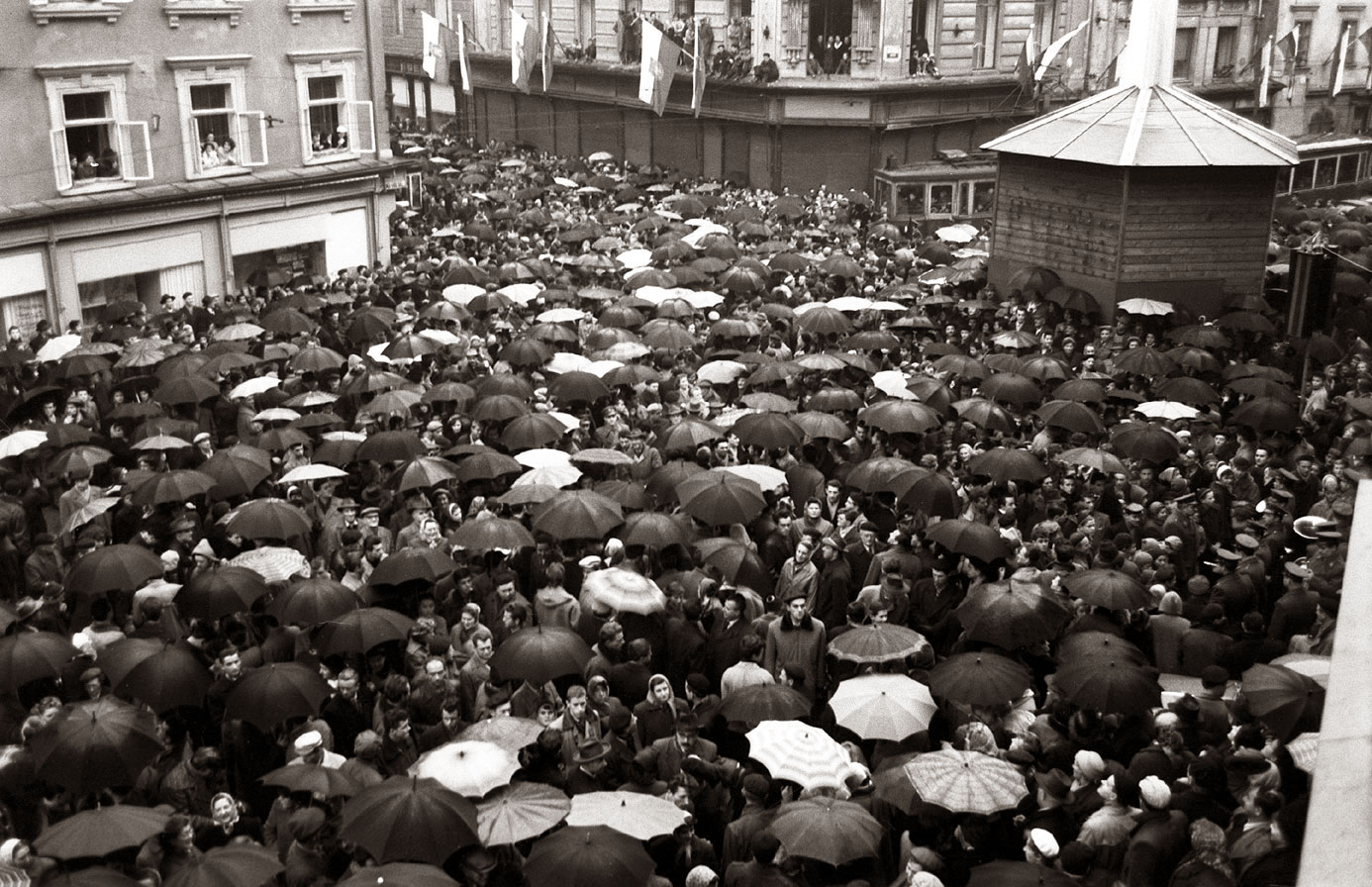 Pogreb ljubljanskega tramvaja